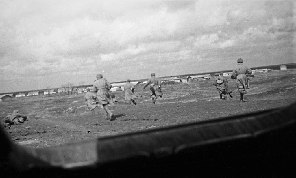 3-й Украинский фронт. Бои за освобождение города Херсона